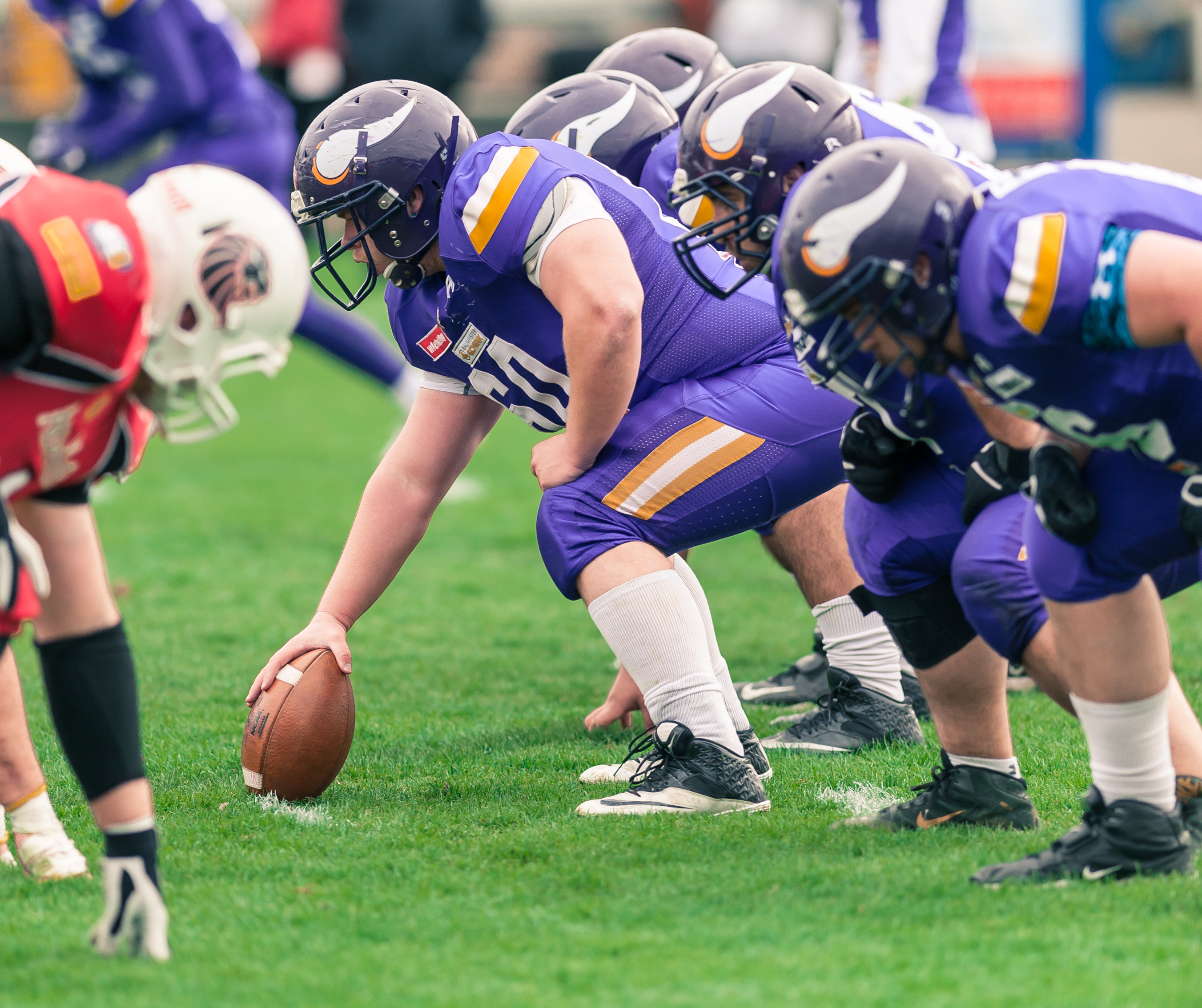 BIG6 European Football League - Vienna Vikings vs New Yorker Lions Braunschweig am 24. April 2016 in Wien. Bild zeigt Florian Tomasin (Vienna Vikings).